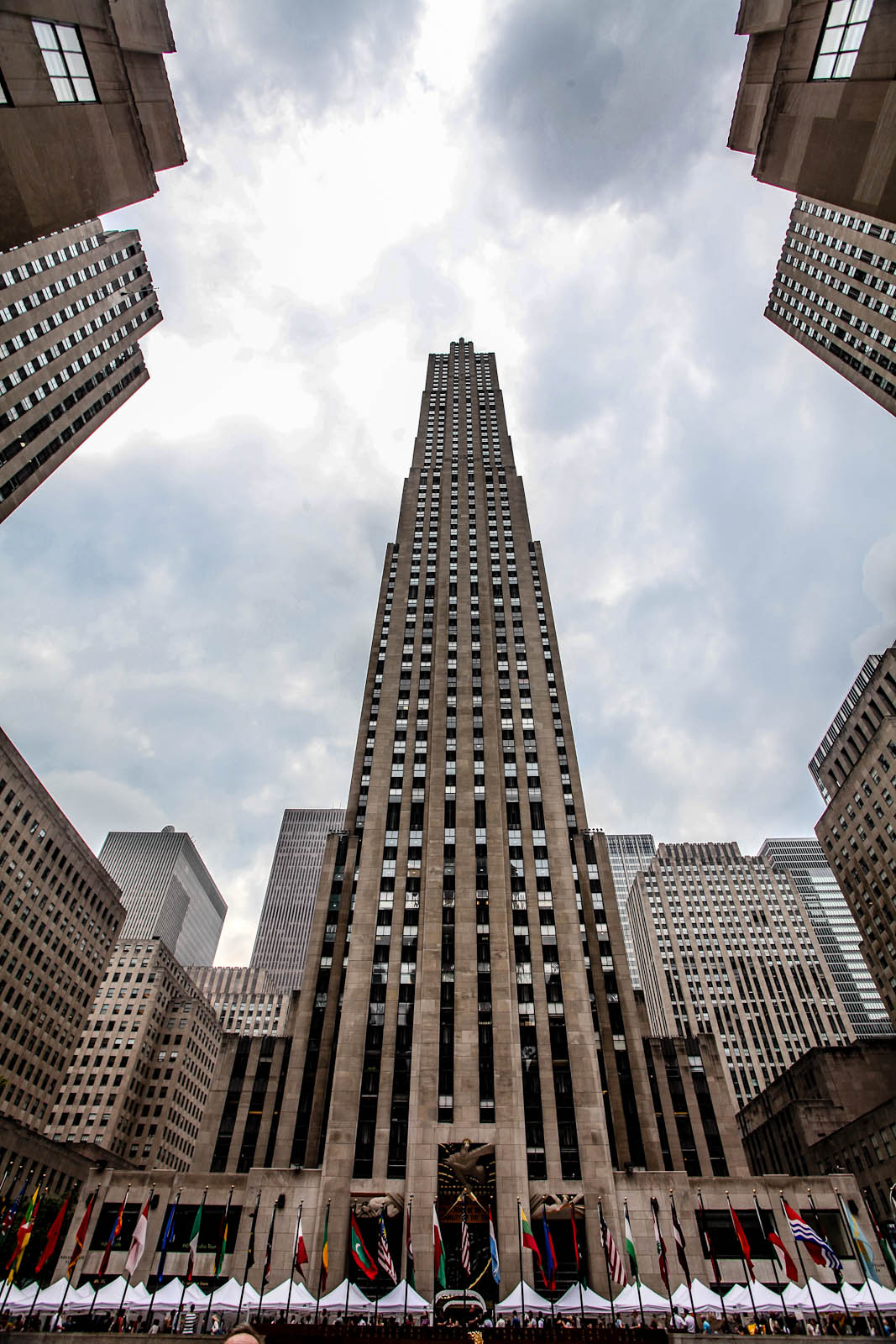 GE Building - Rockefeller Plaza